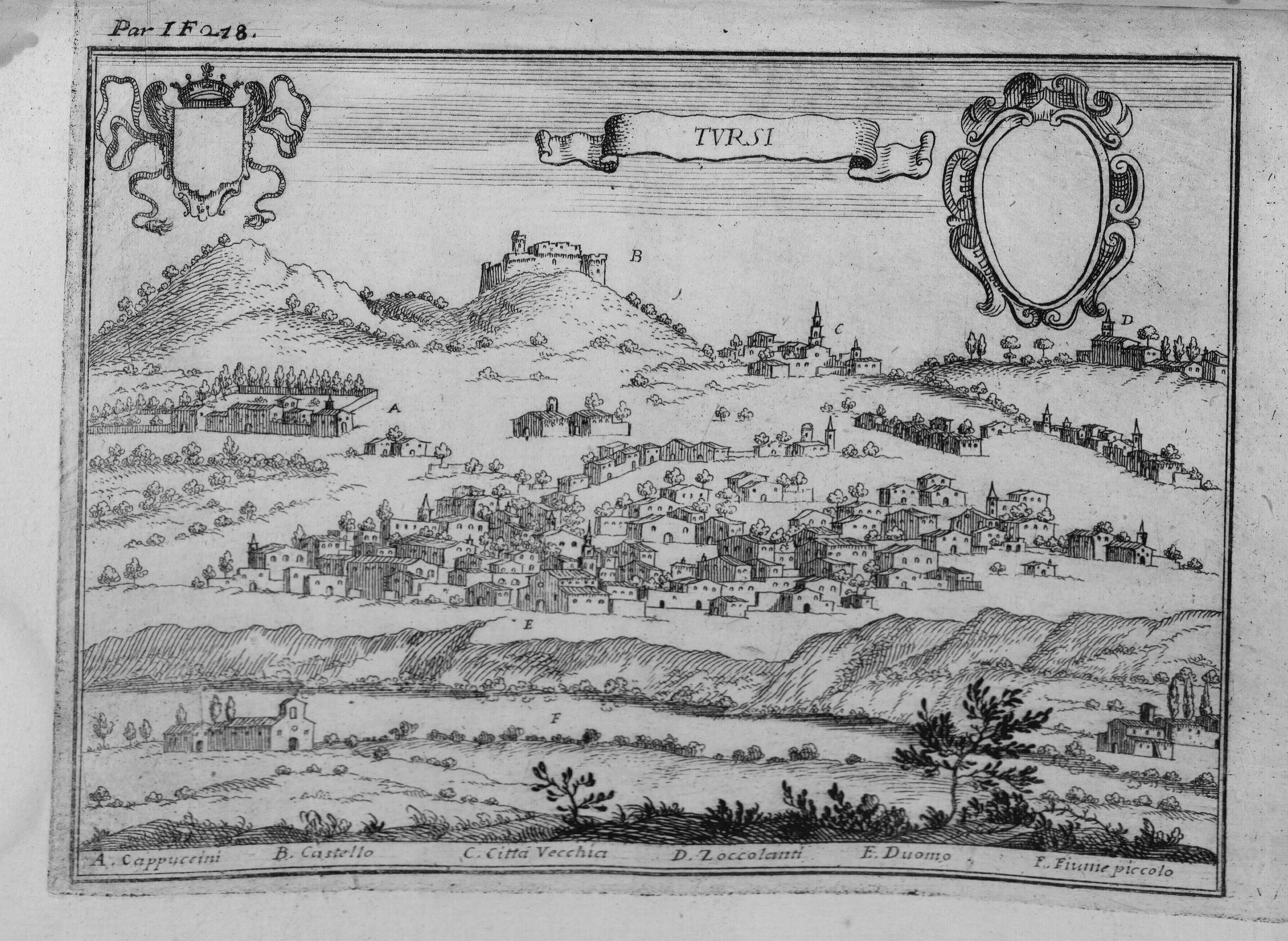 Autor: Pacichelli, Giovanni Battista, 1641-1702 Descripción bibliográfica: Il regno di Napoli in prospettiva : diviso in dodeci provincie, in cui si descrivono la sua Metropoli Fidelissima città di Napoli ... Opera postuma divisa in tre parti / dell'abatte Gio. Battista Pacichelli ; Parte prima [-terza] ... Del regno di Napoli in prospettiva / dell'abate Pacichelli. Parte prima. - In Napoli : nella Stamperia di Michele Luigi Mutio, 1703. - v. : principalmente il.; 4º . - Inic. adorn. y frisos dec. - Grab. calc. y h. pleg. grab. calc. de mapas de Cassianus de Silva. Ilustrador: Cassiano De Silva, Francesco, il. Impresor: Muzio, Michele Luigi, imp. Lugar de impresión: Italia. Nápoles Localización: Vea la ilustración en su contexto